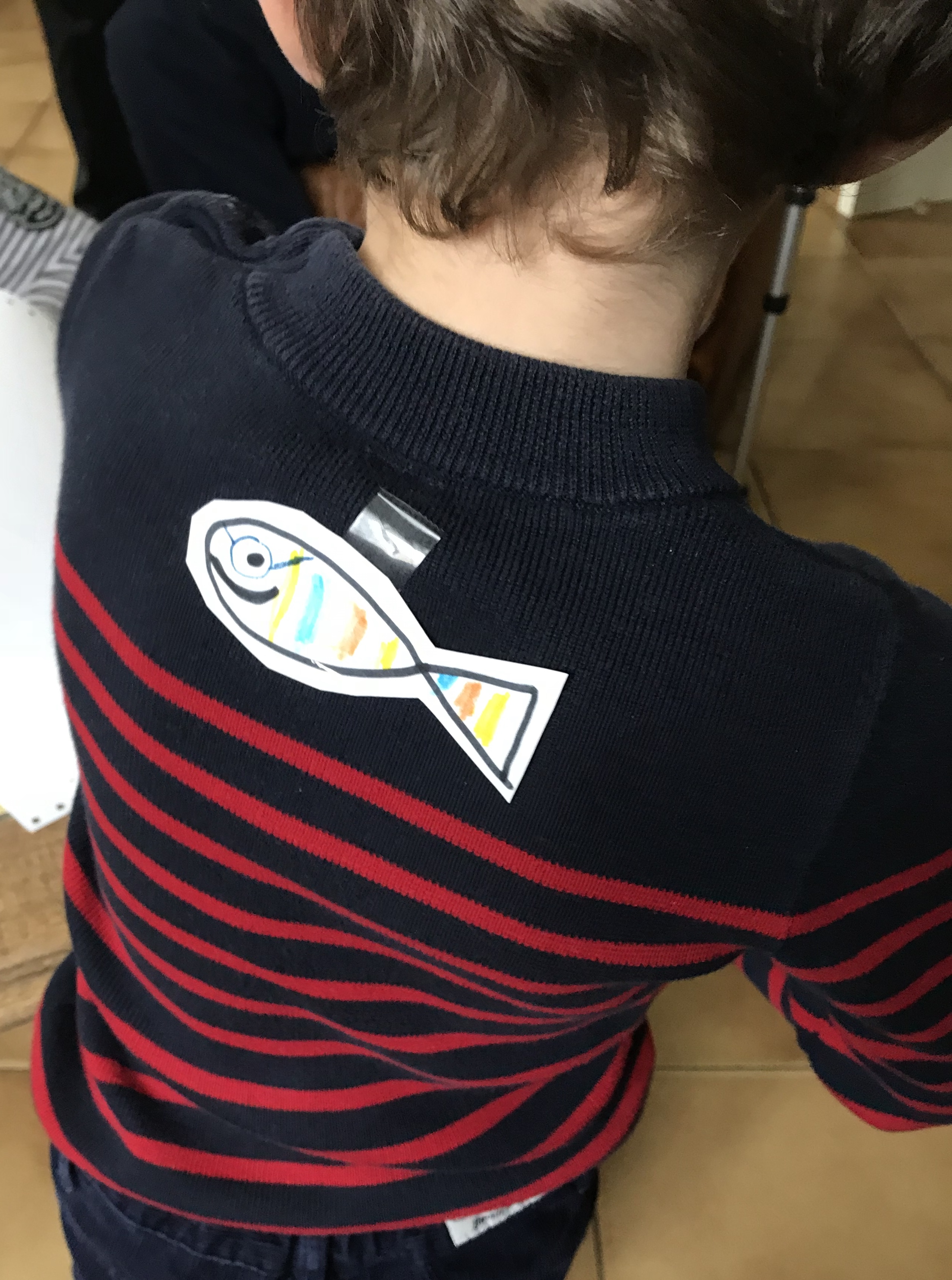 Petit garçon de 6 ans et demi "victime" d'un poisson d'avril, le 1er avril 2018.